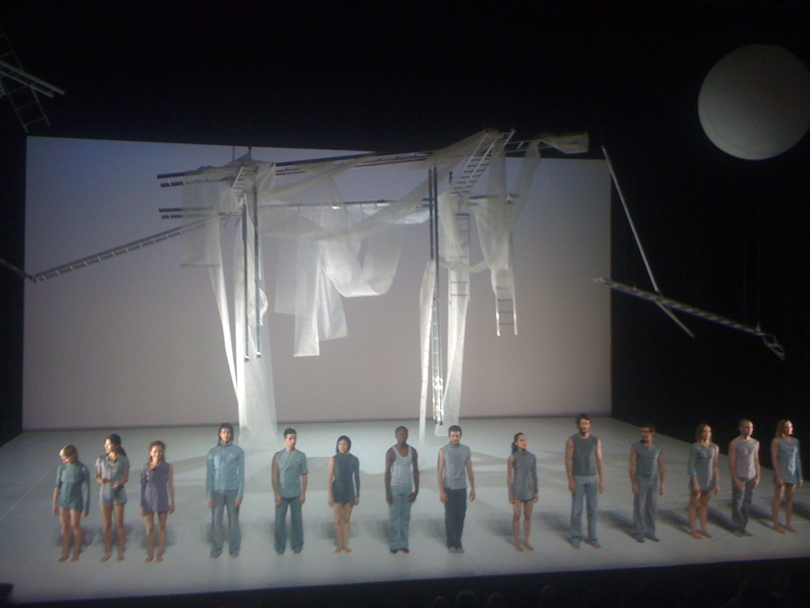 La Vérité 25x par seconde par Frédéric Flamand et le Ballet National de Marseille, installation de Ai Weiwei à Chaillot